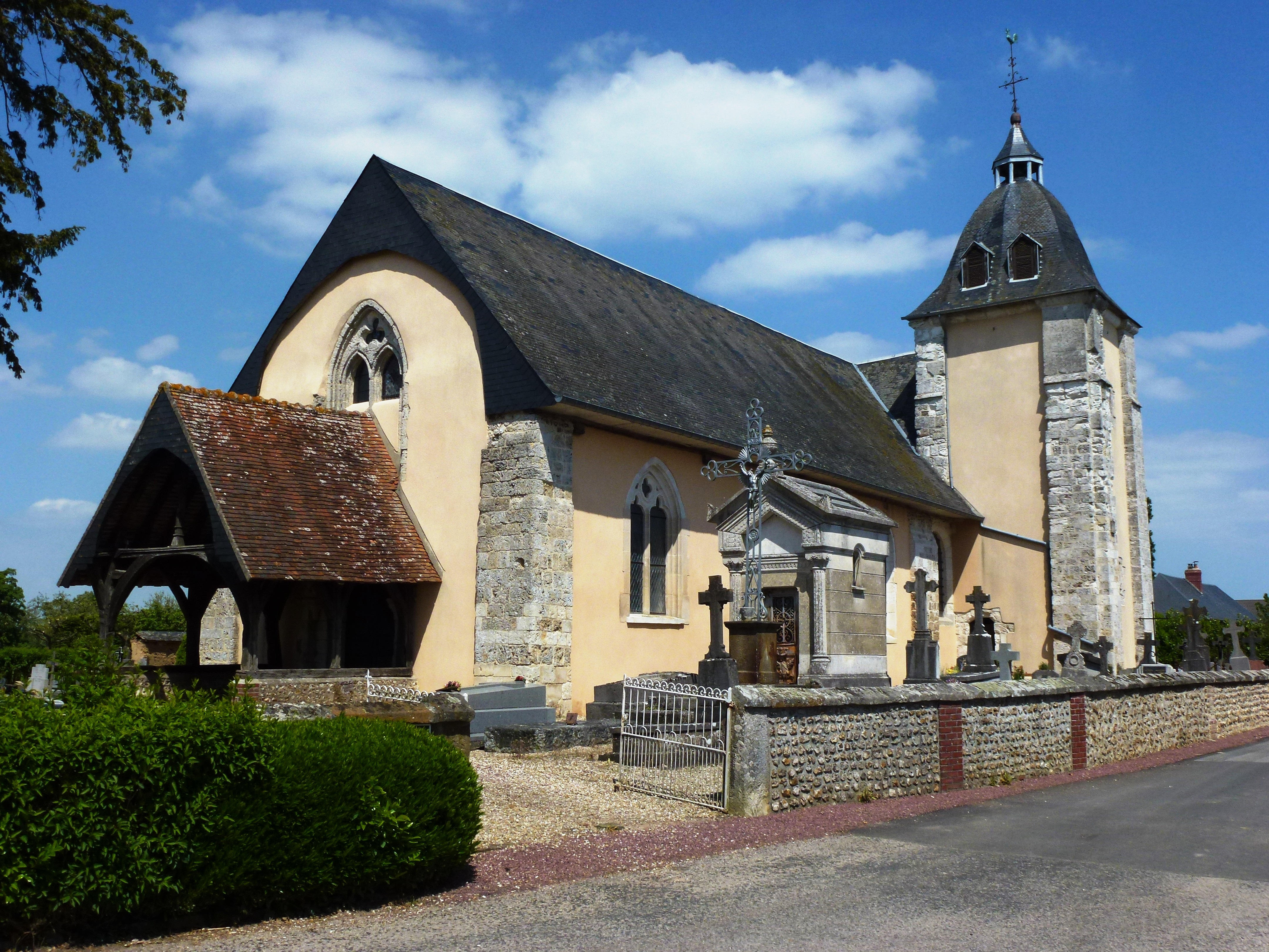 Piencourt (Eure) église Saint-Saturnin